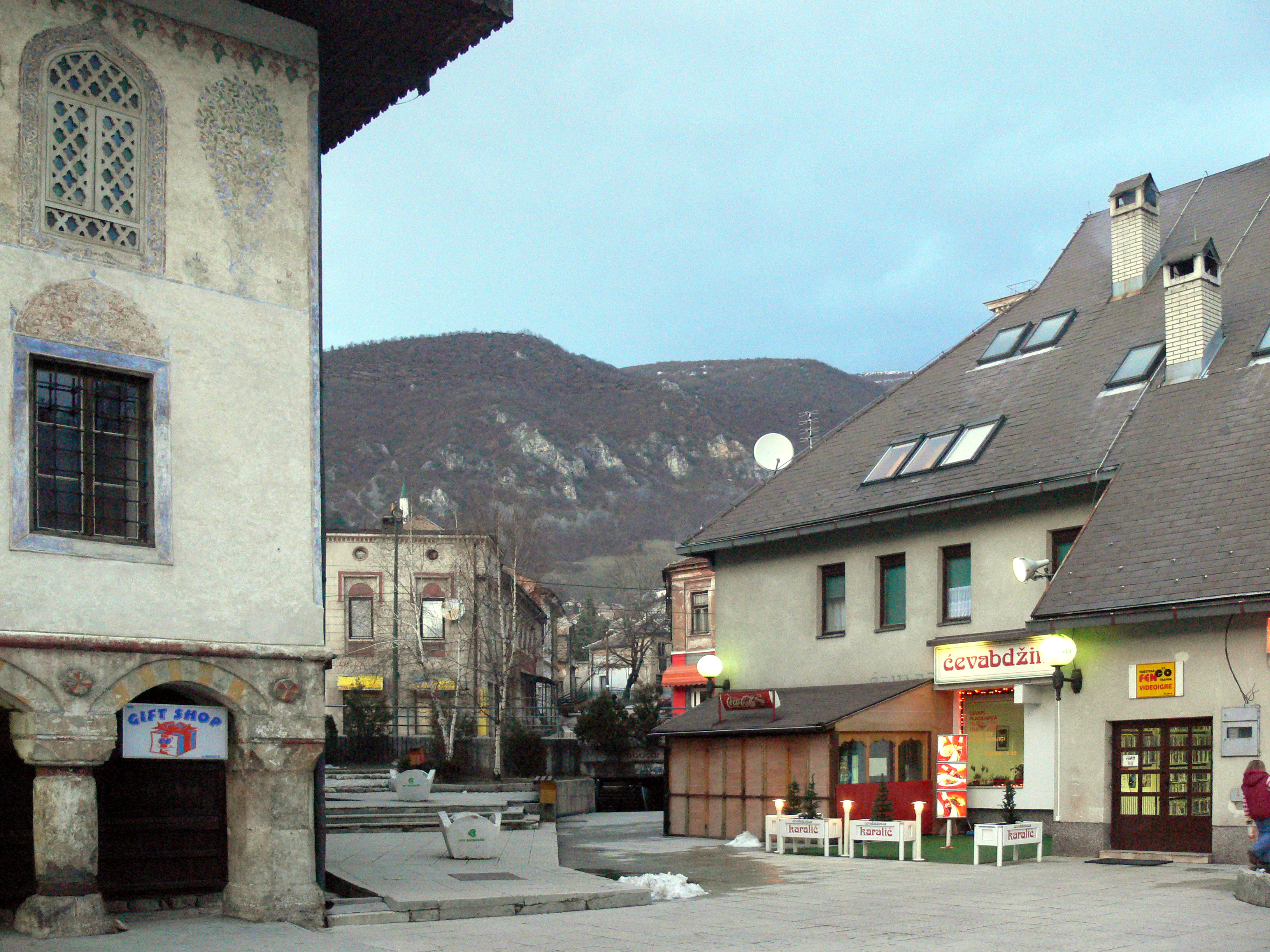 Travnik